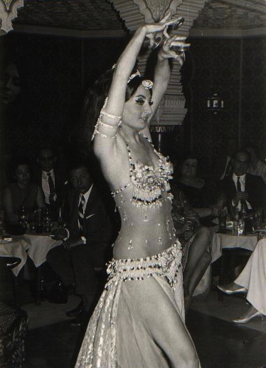 Dalilah